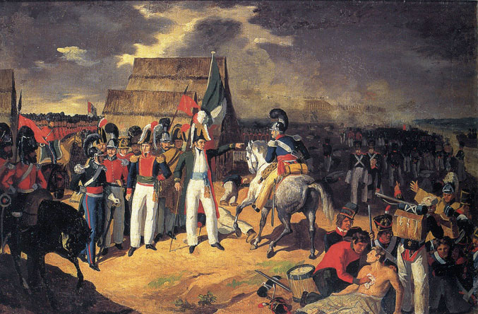 Carlos Paris, Acción militar en Pueblo Viejo, septiembre de 1829, 1835, otros títulos: Batalla de Tampico. CNCA, INAH, Museo Nacional de Historia. Imagen tomada de: De la patria criolla a la nación mexicana, 1750-1860, México, Museo Nacional de Arte, Banamex, CONACULTA, INBA, UNAM, IIE, 2000 (Los pinceles de la historia), p. 192.